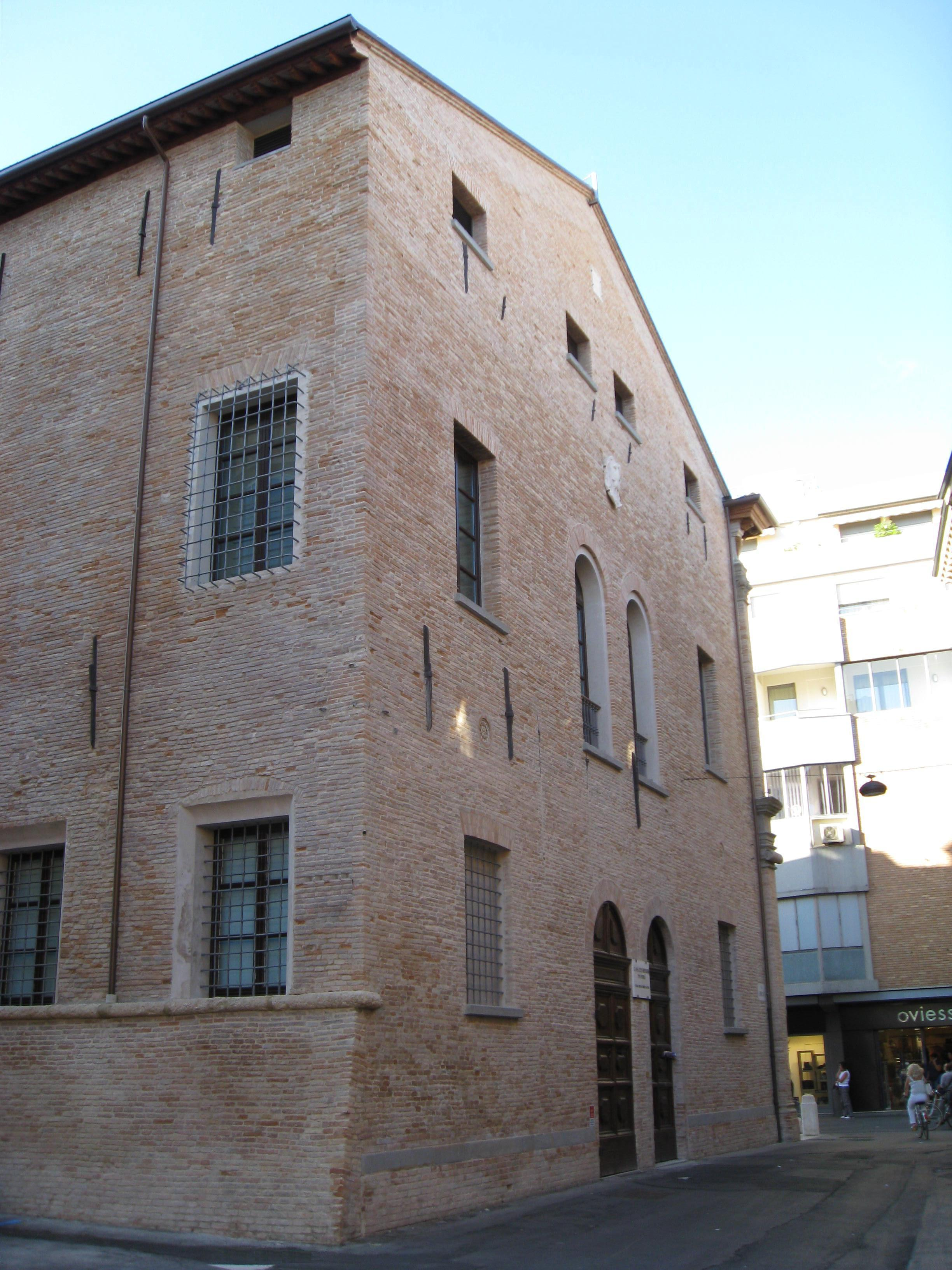 Perkele, faccia laterale del Monte di Pietà di Forlì